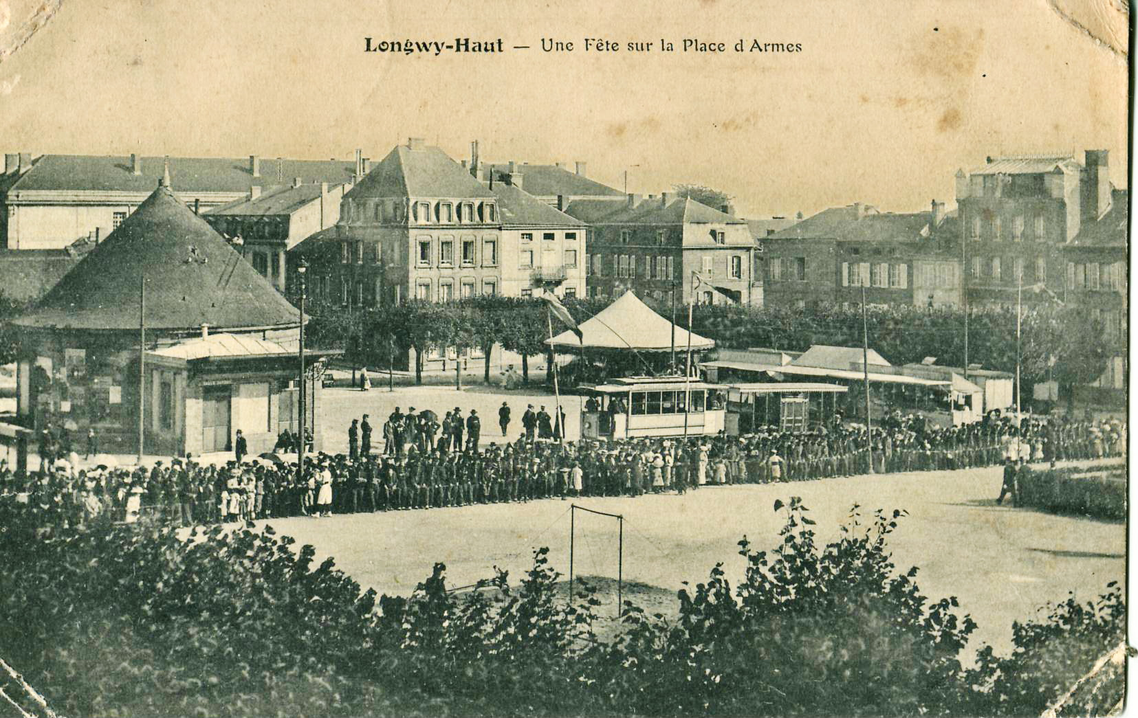 Carte postale ancienne éditée par V. Kremer à Longwy-Haut, série A, n°55 : LONGWY-HAUT - Une fête sur la Place d'Armes